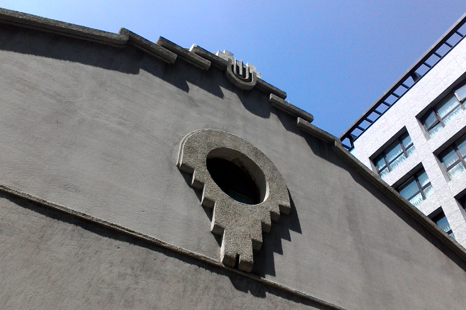 內湖庄役場會議室背側牛眼窗,台北市內湖區金龍次分區湖濱里